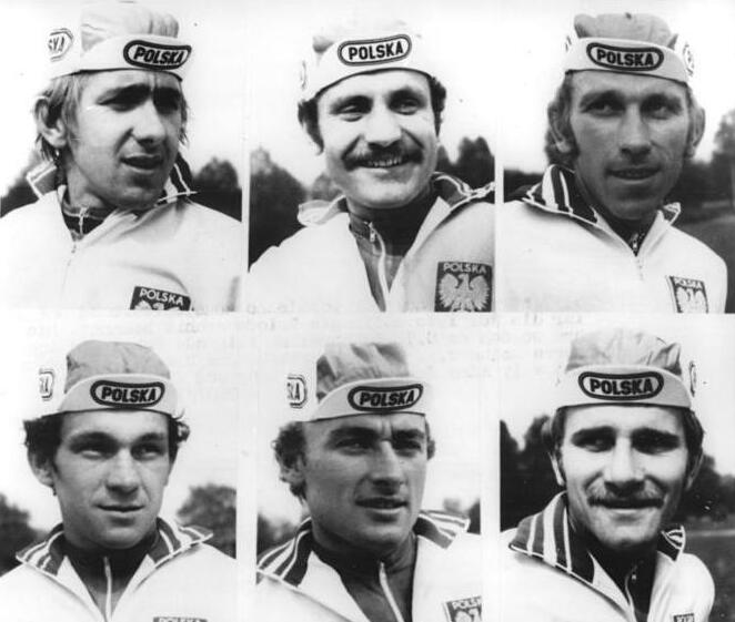 Radrennfahrer, Polen PI-CAF-7.5.77-str- Warschau: Der Polnische Radsportverband hat sein Aufgebot für die 30.Internationale Friedensfahrt benannt. Die Jubiläumsfahrt werde am 8.5.77 in Warschau folgende Fahrer in Angriffnehmen: Obere Reihe v.l. Tadeusz Mytnik,Jan Brzozny, Jan Raozkowski. Untere Reihe v.l. Adam Jagla, Czeslaw Lang und Wieslaw Bielski.